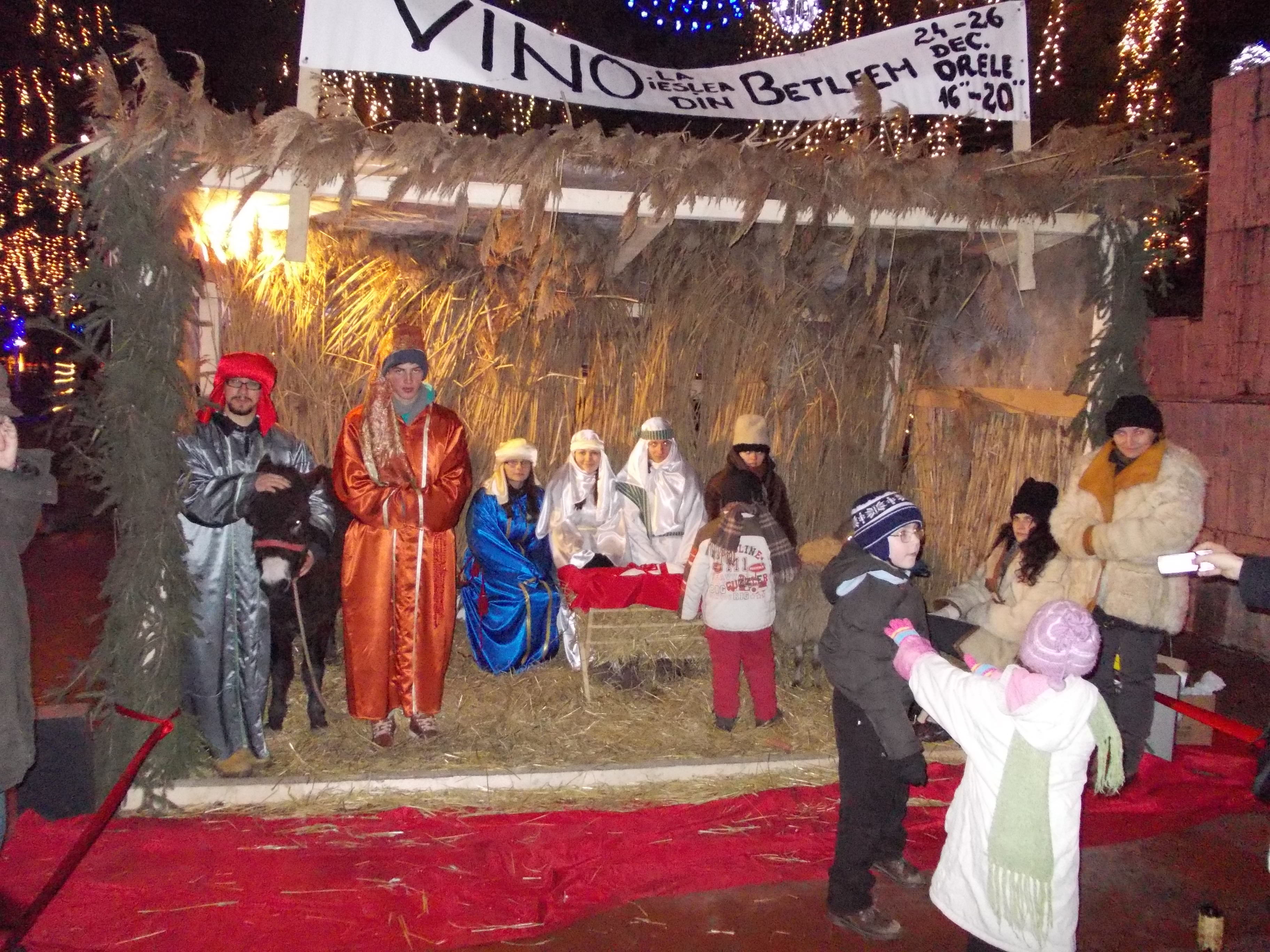 Belen, en plaza Roman Muşat, Roman, Rumania